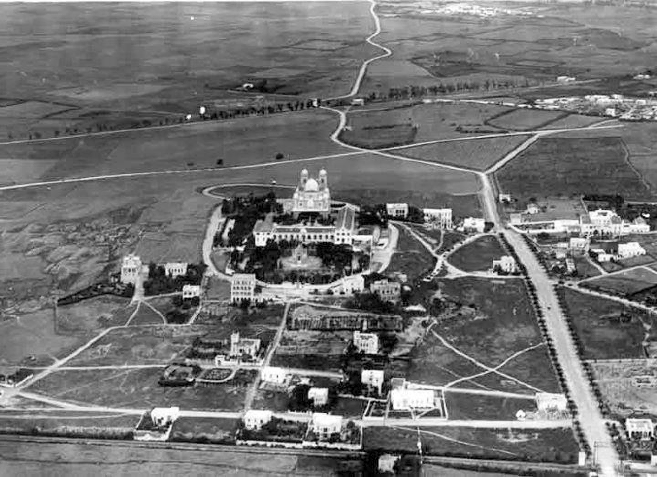 Vue aérienne de la banlieue de Carthage avec vue l'ancienne Cathédrale de Saint-Louis